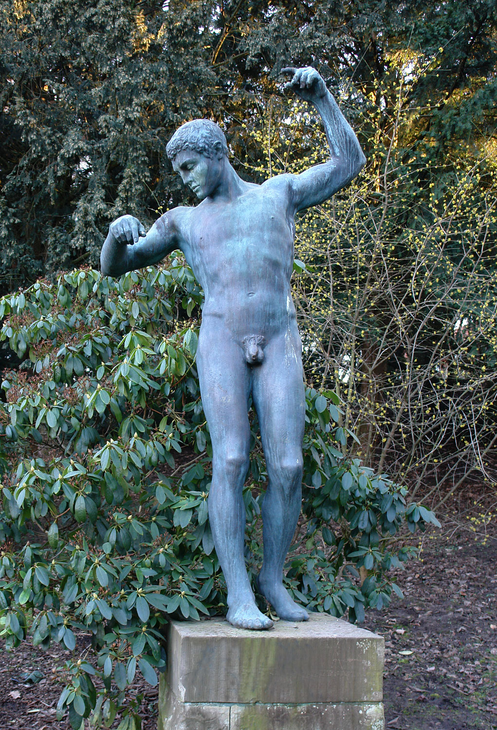 Jüngling, Denkmal für die Gefallenen der Division Gerstenberg und des Freicorps Caspari. Entwurf: Herbert Kubica (1936). Standort: Bremer WallanlagenDas abgebildete Objekt ist ein geschütztes Kulturdenkmal in der Freien Hansestadt Bremen, mit der Nr. 1193,T011 beim Landesamt für Denkmalpflege registriert.